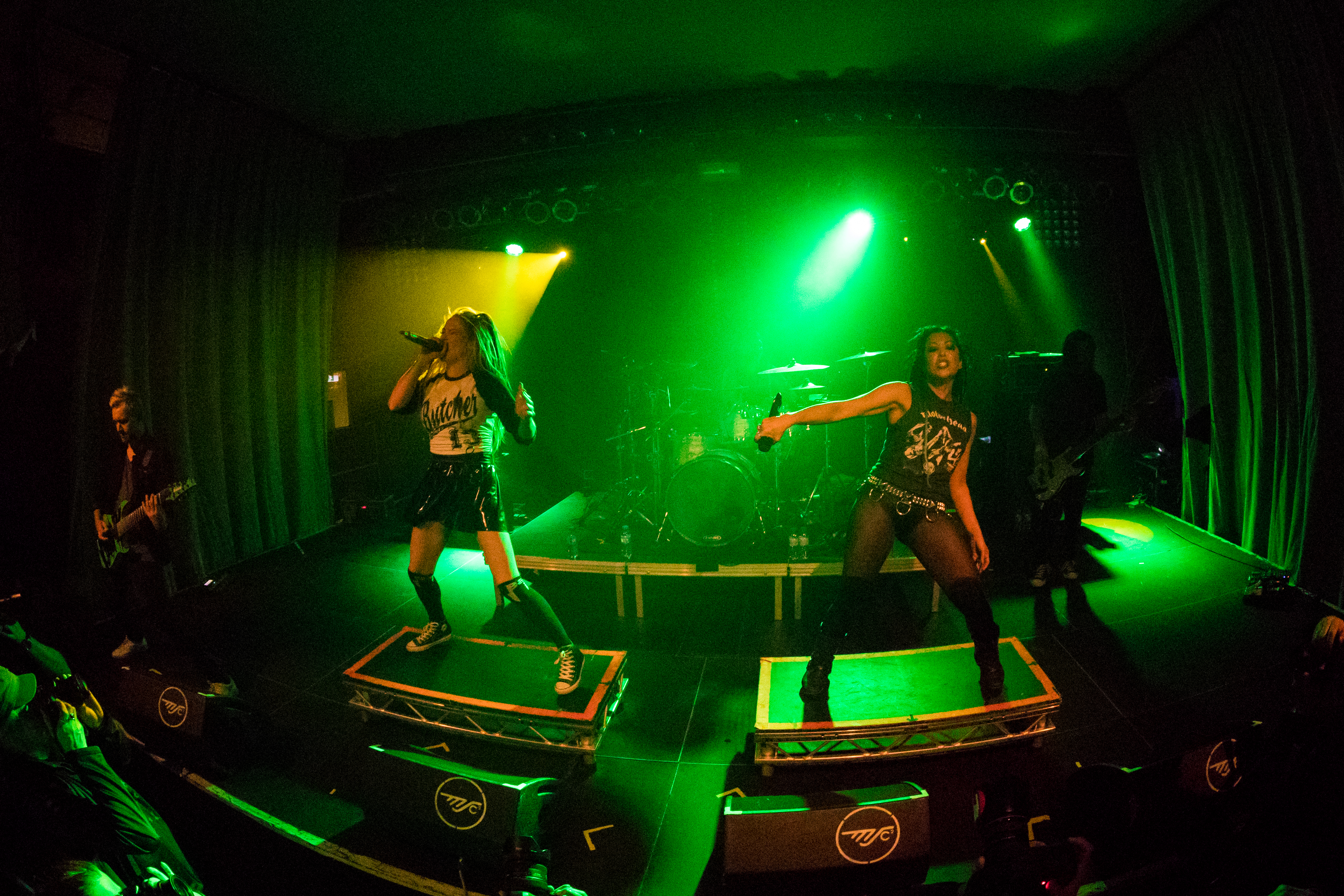 Butcher Babies during Butcher Babies (Support: Klogr & Eyes Set To Kill) at MS Connexion Complex, Mannheim, Baden-Württemberg, Germany on 2018-03-15, Photo: Sven Mandel